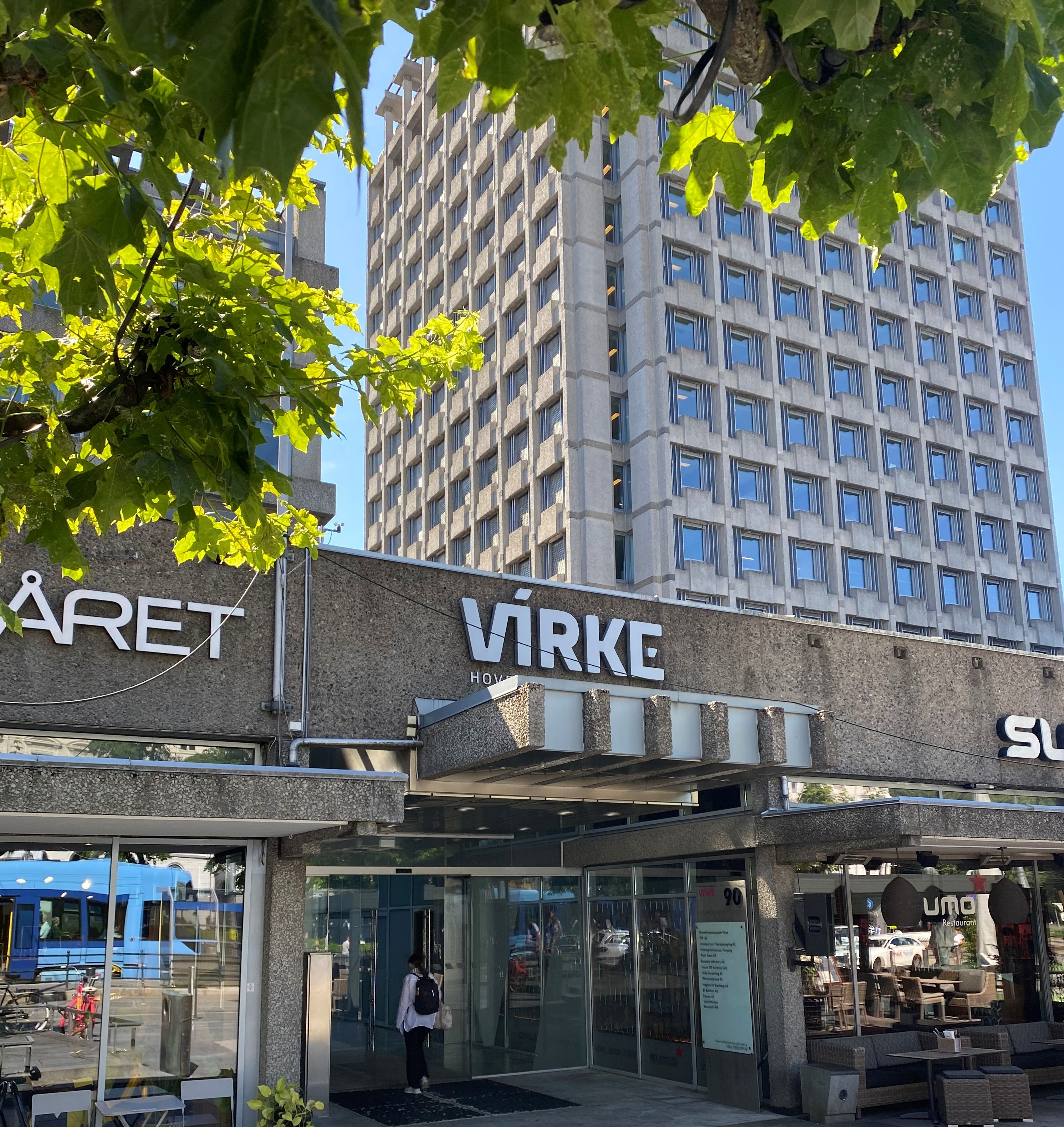 Virkes hovedkontor på Solli Plass i Oslo.